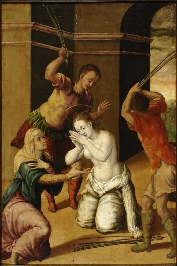 La obra representa el momento en que la mártir cristiana Santa Apolonia de Alejandría fue azotada por sus verdugos.